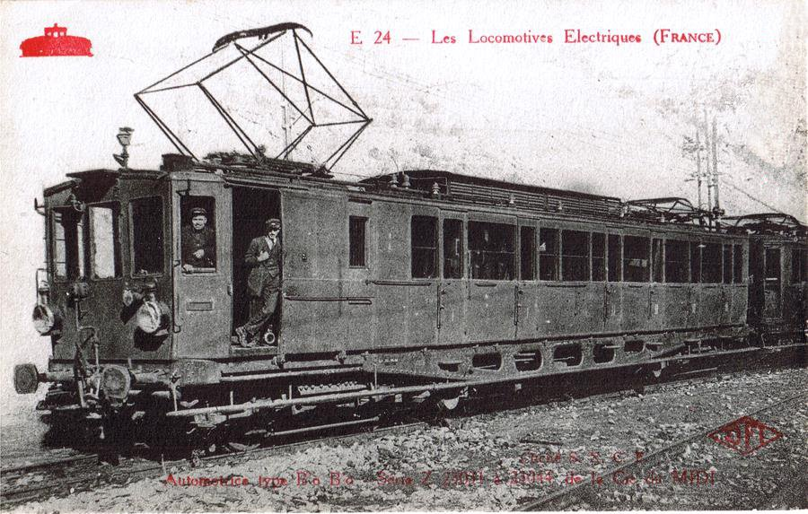 Automotrice 12 kV 16⅔ Hz Midi Z 23031 à Z 23044, ex Midi E ABD 1, 3 à 14 & 16, 1912, future SNCF Z 4900 (4901 à 4914).